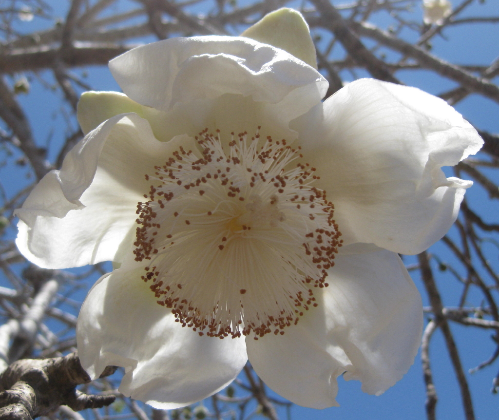 Adansonia digitata flower